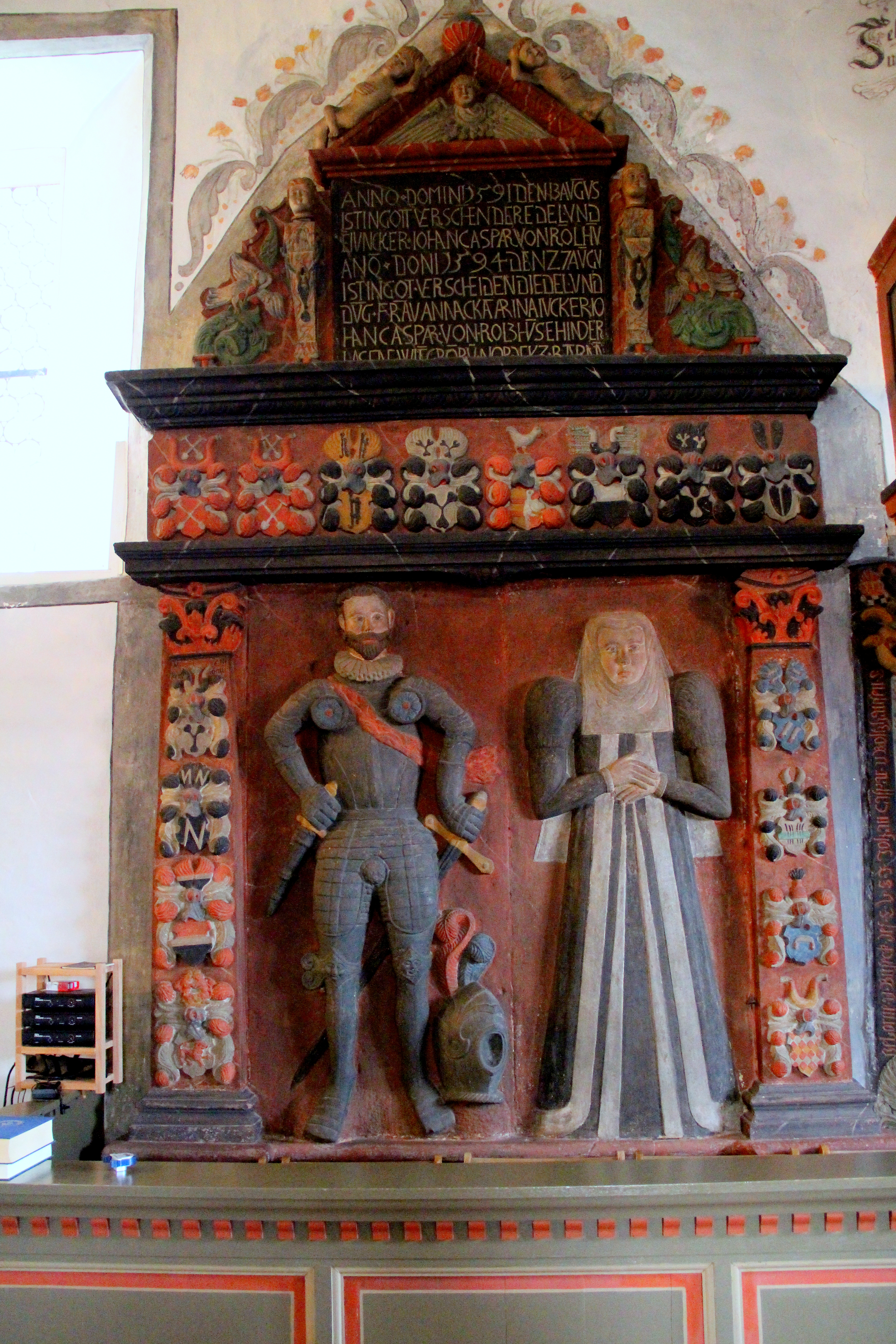 Kirche Salzböden